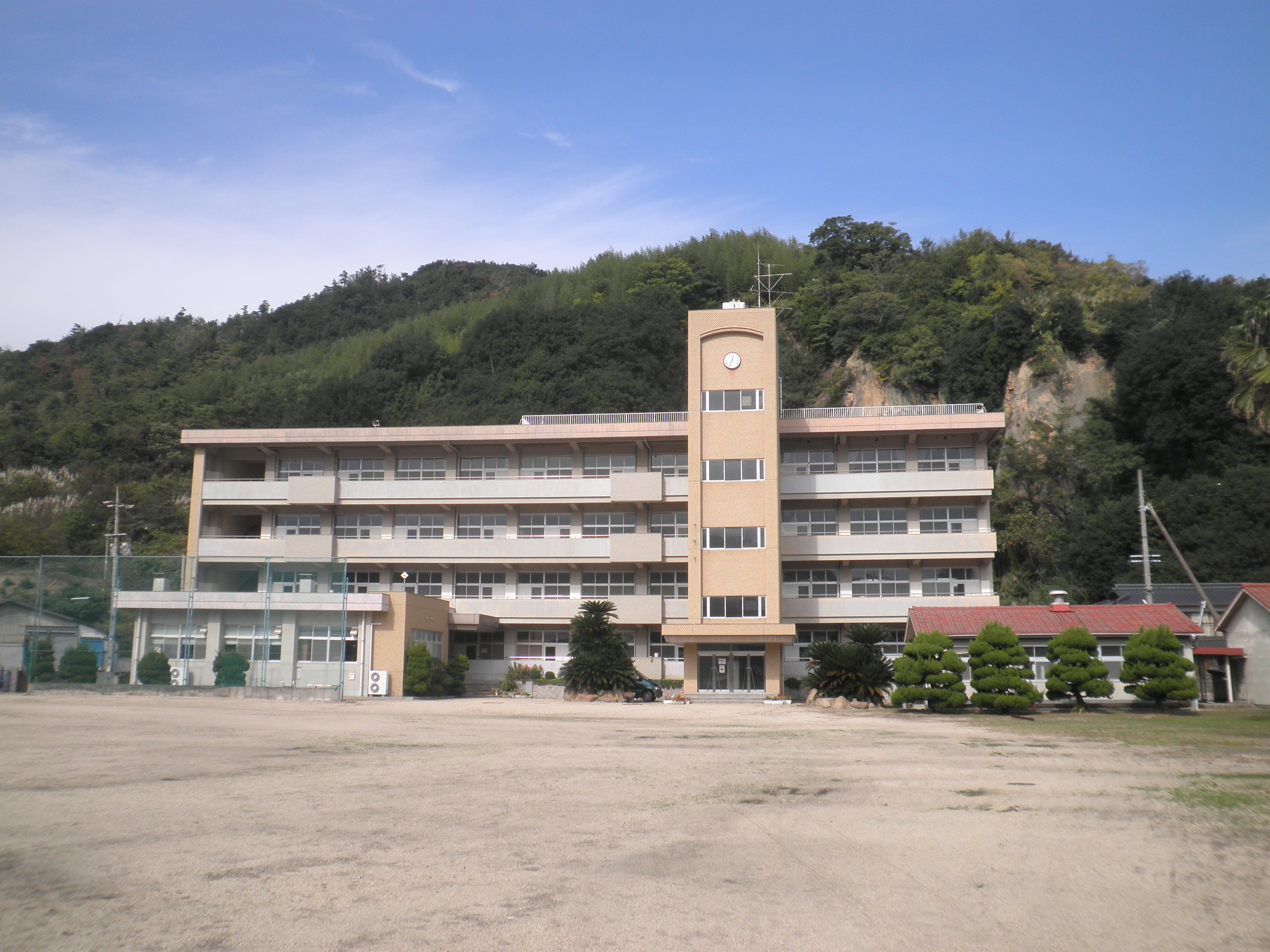 笠岡諸島の北木島の大浦集落にある北木中学校